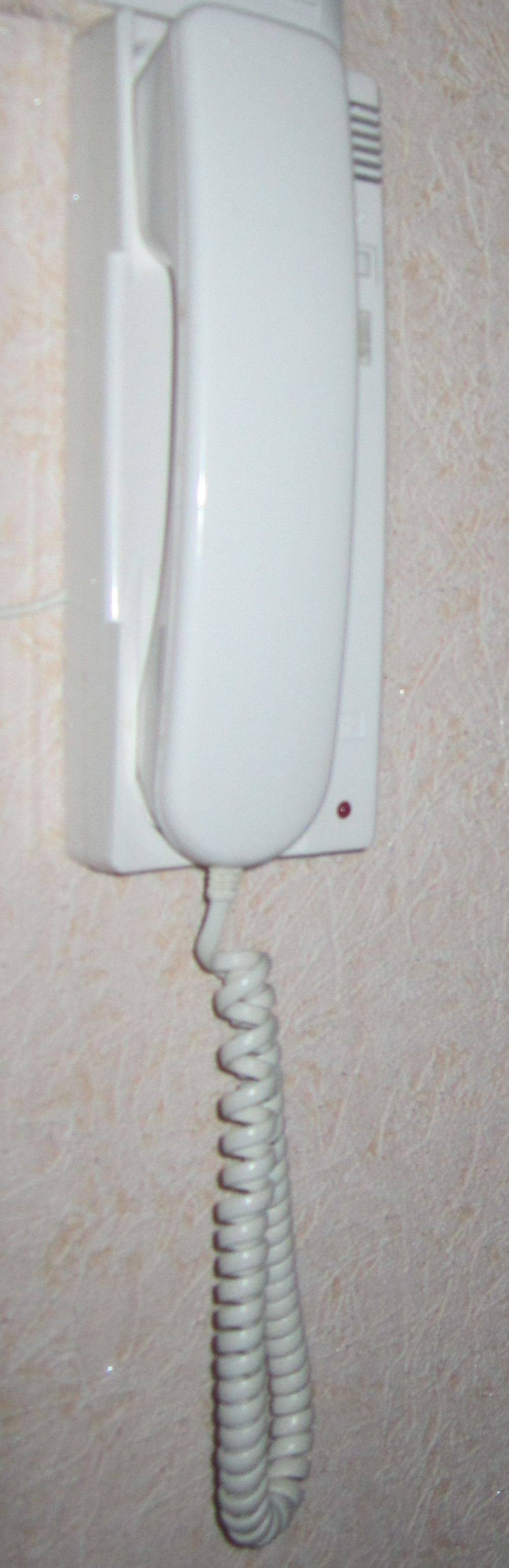 домофон